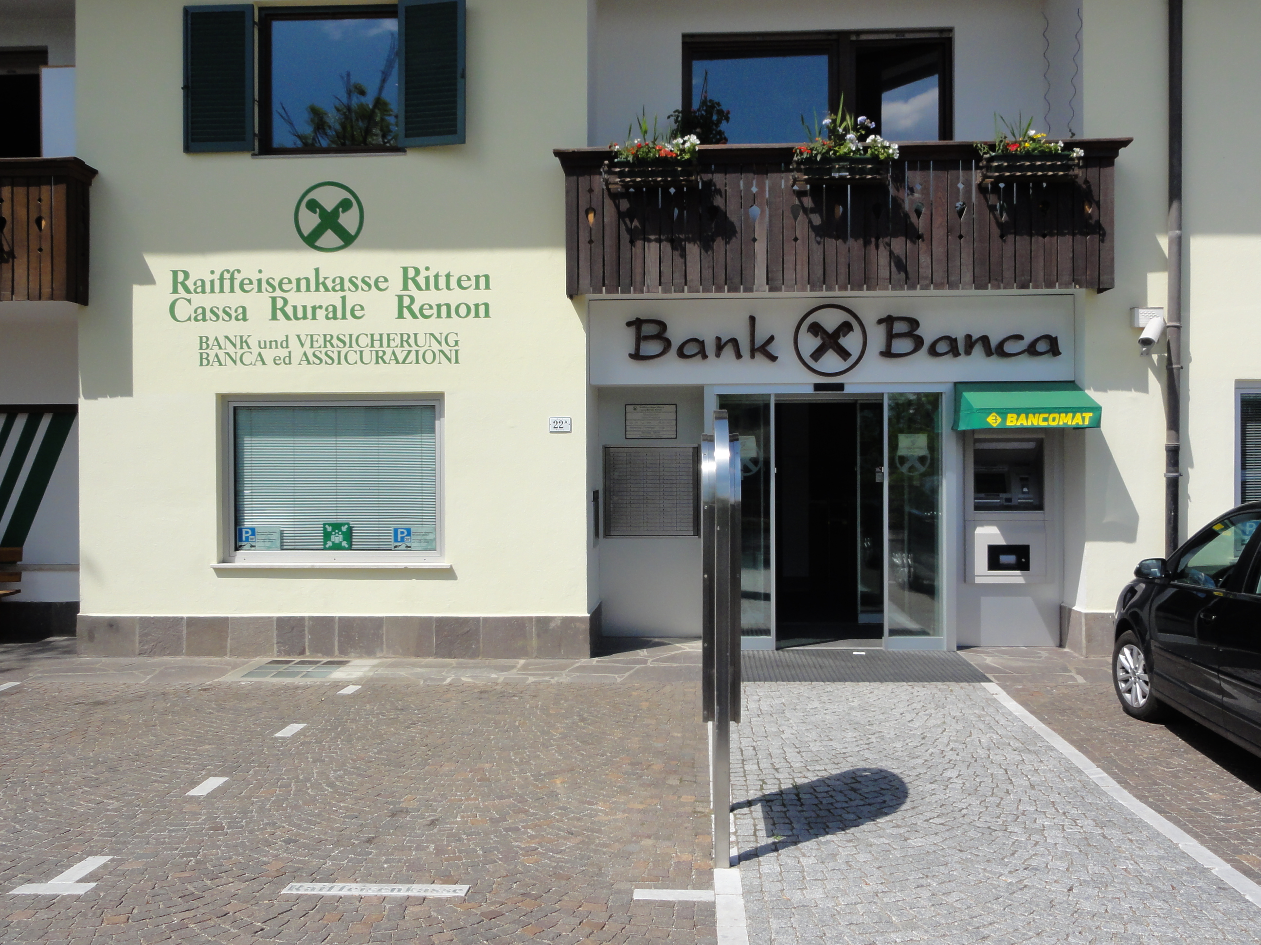 Raiffeisenbank-Filiale in Ritten — Außenansicht